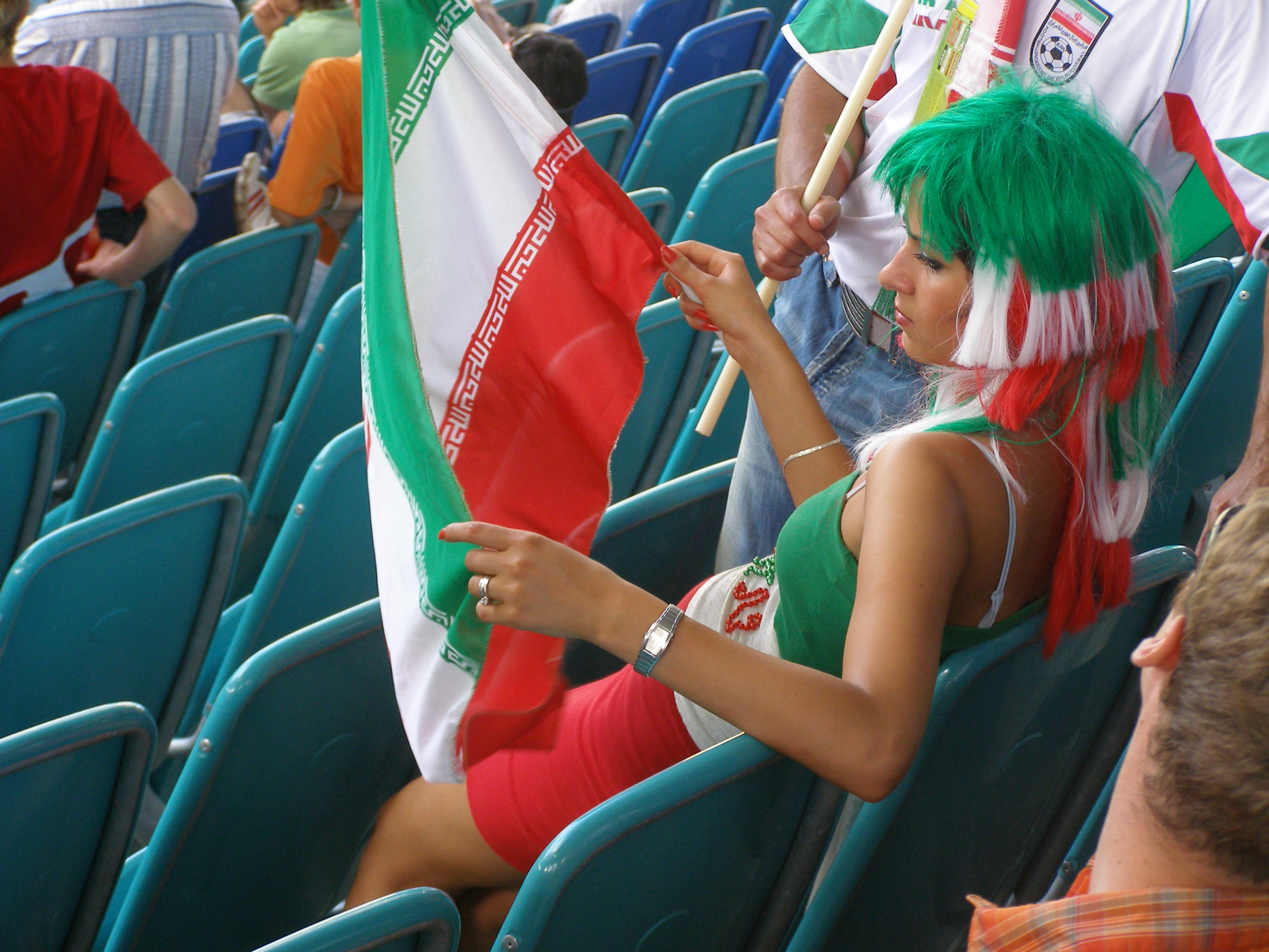 Iranian girl in Iran-Angola game